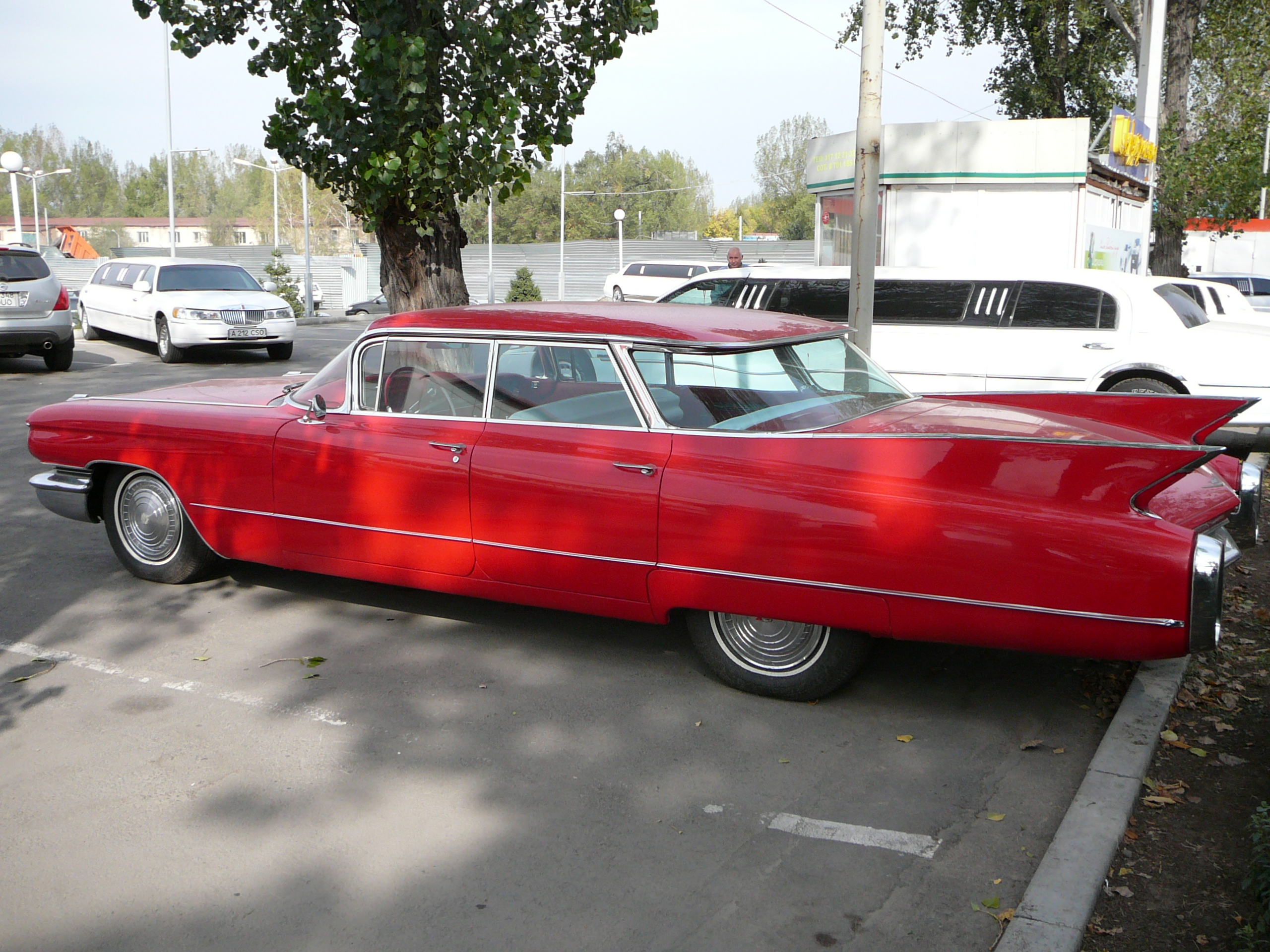 Кадиллак Эльдорадо 1960 года. Алма-Ата.